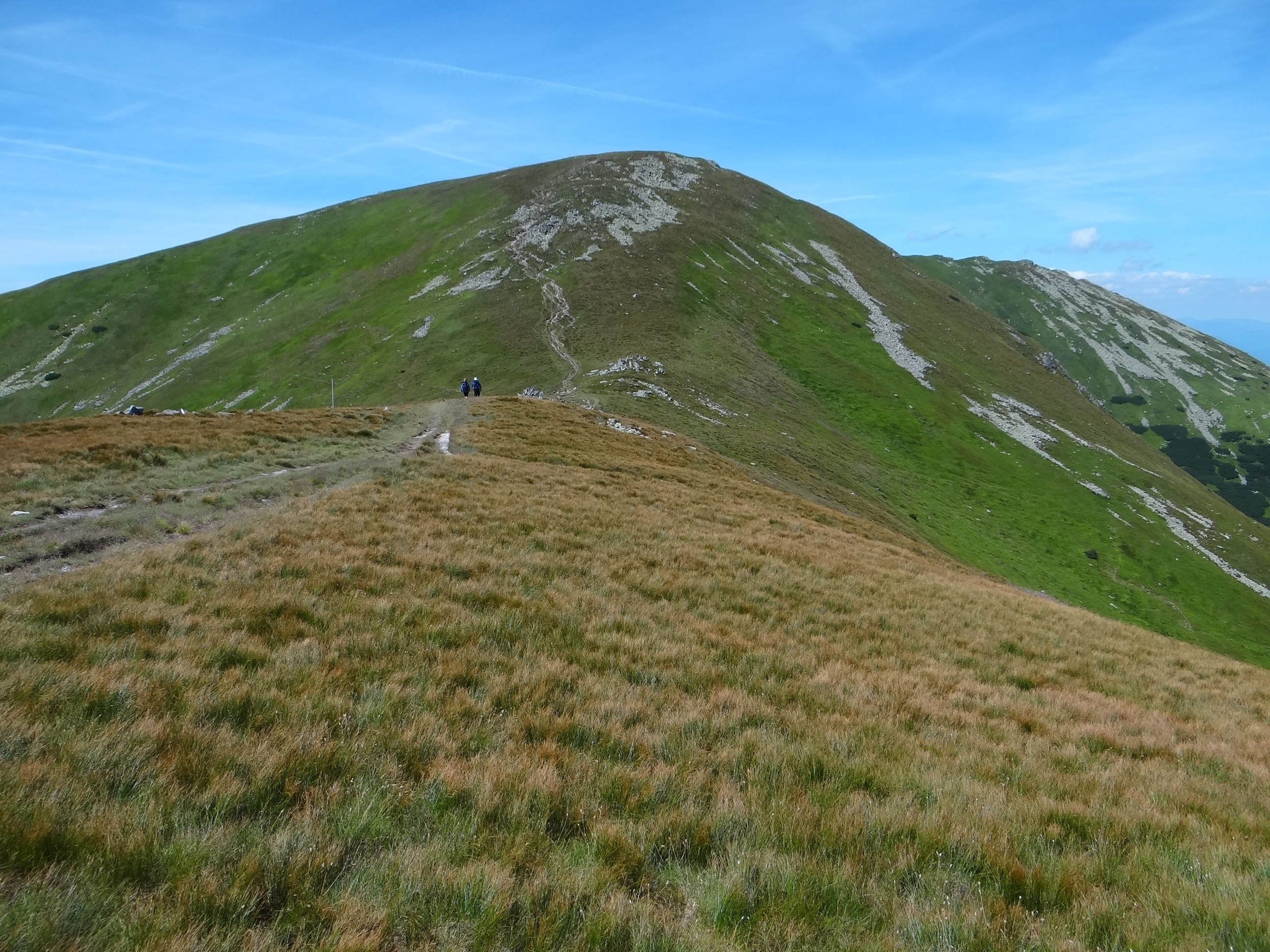 Chabenec. View from Kotliska